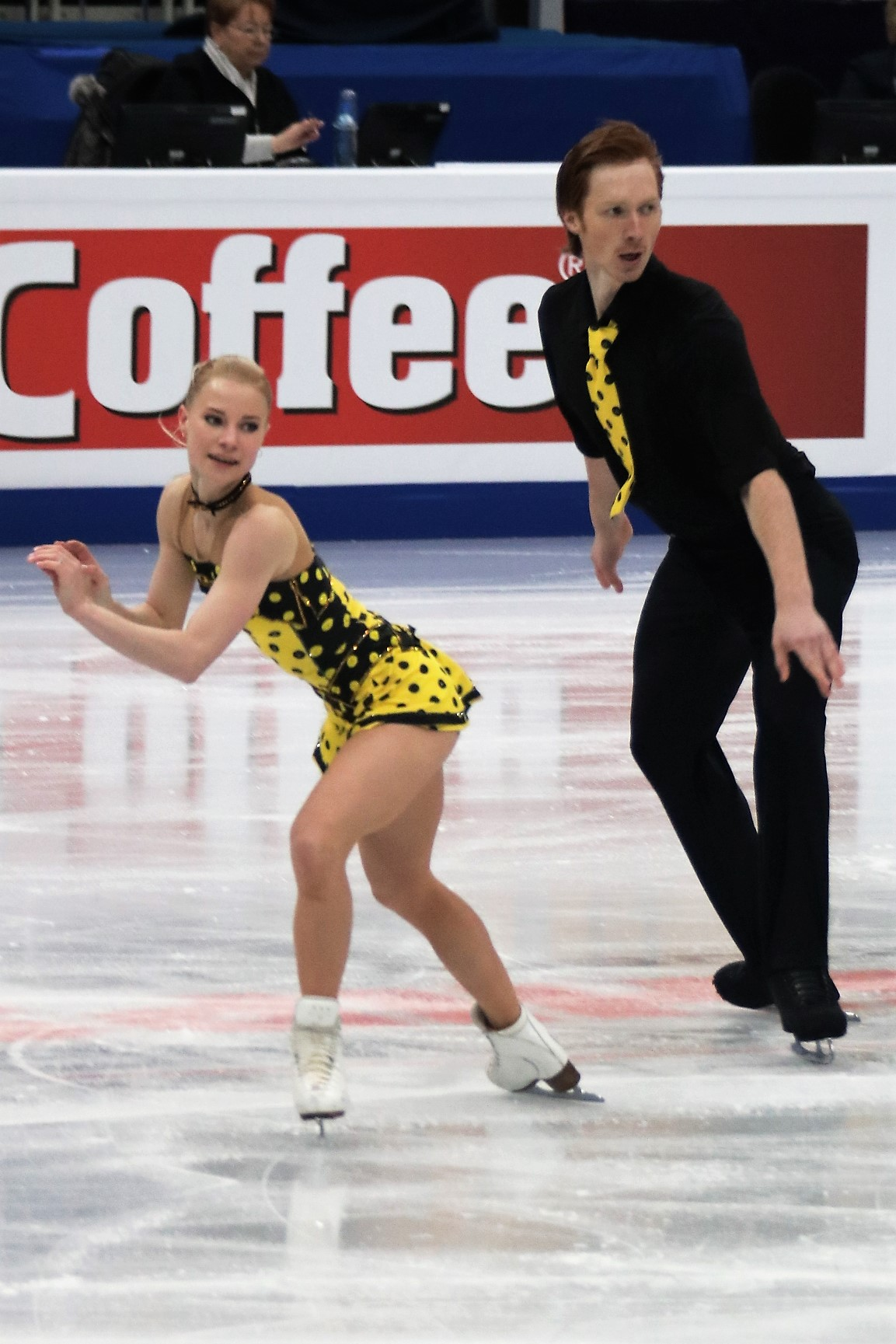 Евгения Тарасова / Владимир Морозов (Россия) на Чемпионате Европы по фигурному катанию 2018.